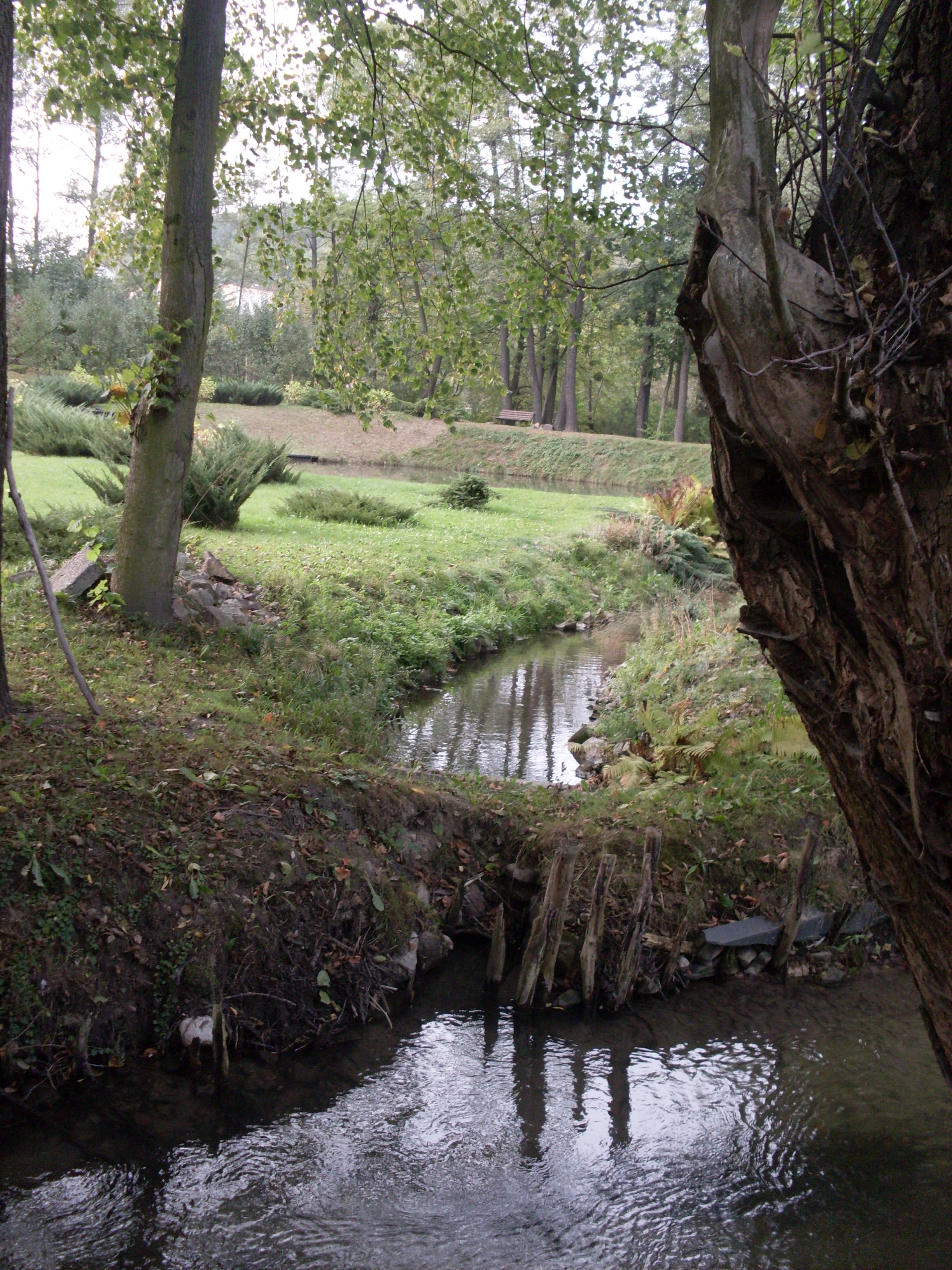 Miękinka wpływająca do Krzeszówki w Krzeszowicach